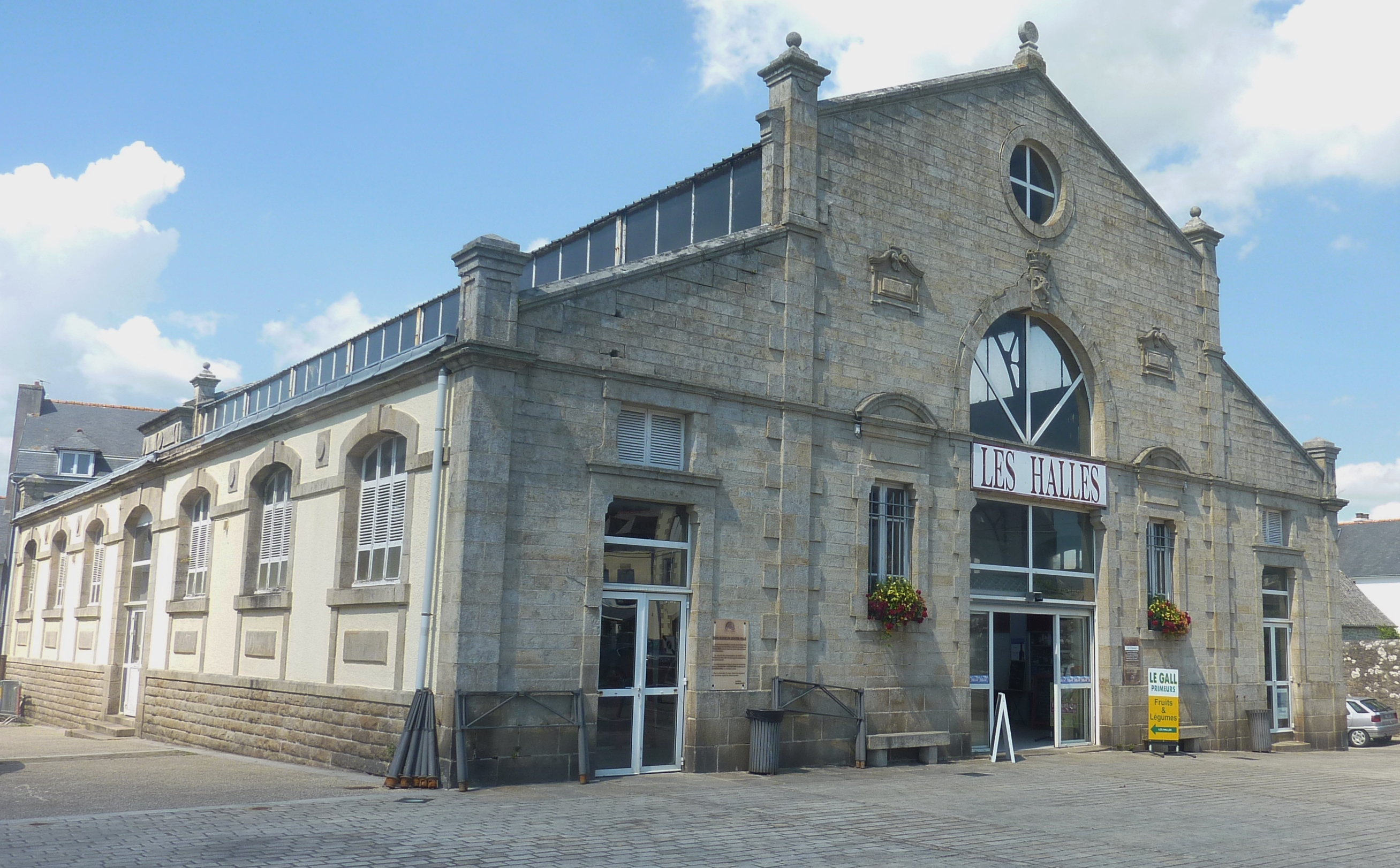 Les halles de Pont-l'Abbé construites en 1899 par Raoul de Najac à l'emplacement de l'ancien marché aux porcs, place de la Madeleine